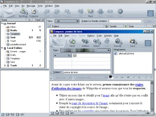 Photo d'écran de Mozilla Mail petit format, Licence GPL et GFDL crée par Rinaldum 6 jan 2004 à 11:16 (CET) Rinaldum